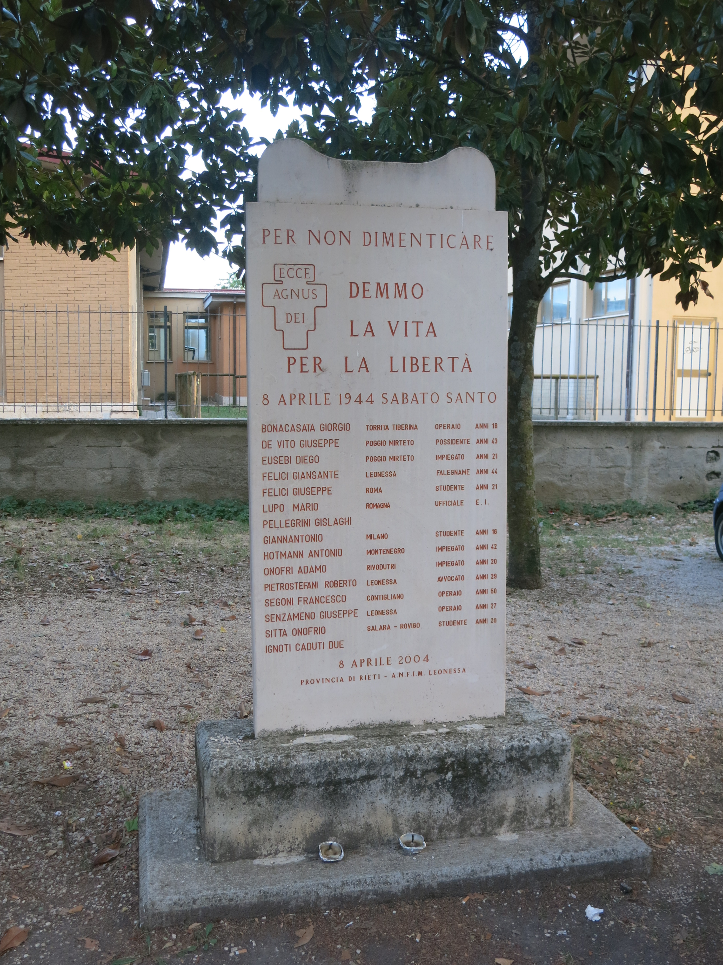 La targa apposta nel 2004 per commemorare l'eccidio delle Fosse Reatine